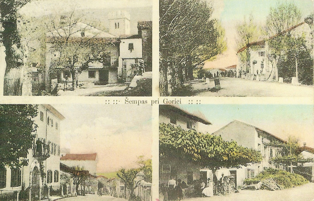 Razglednica Šempasa.